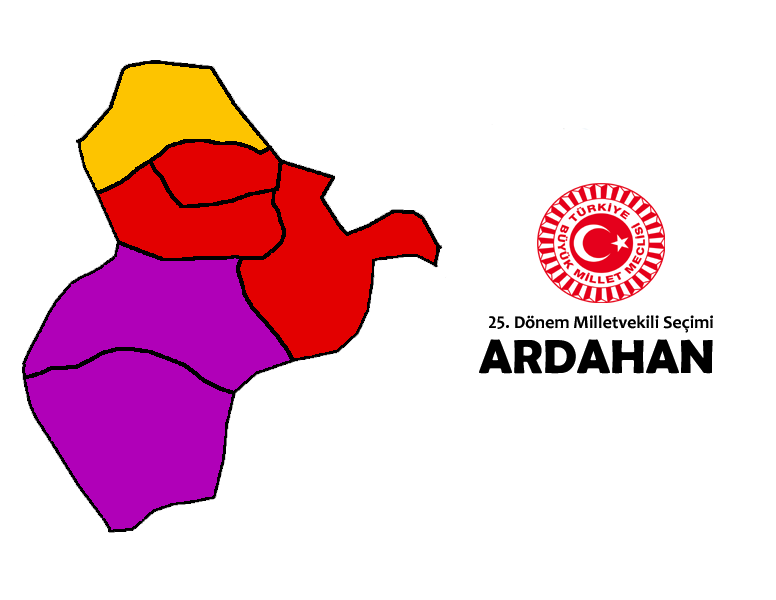 2015 genel seçim sonuçları